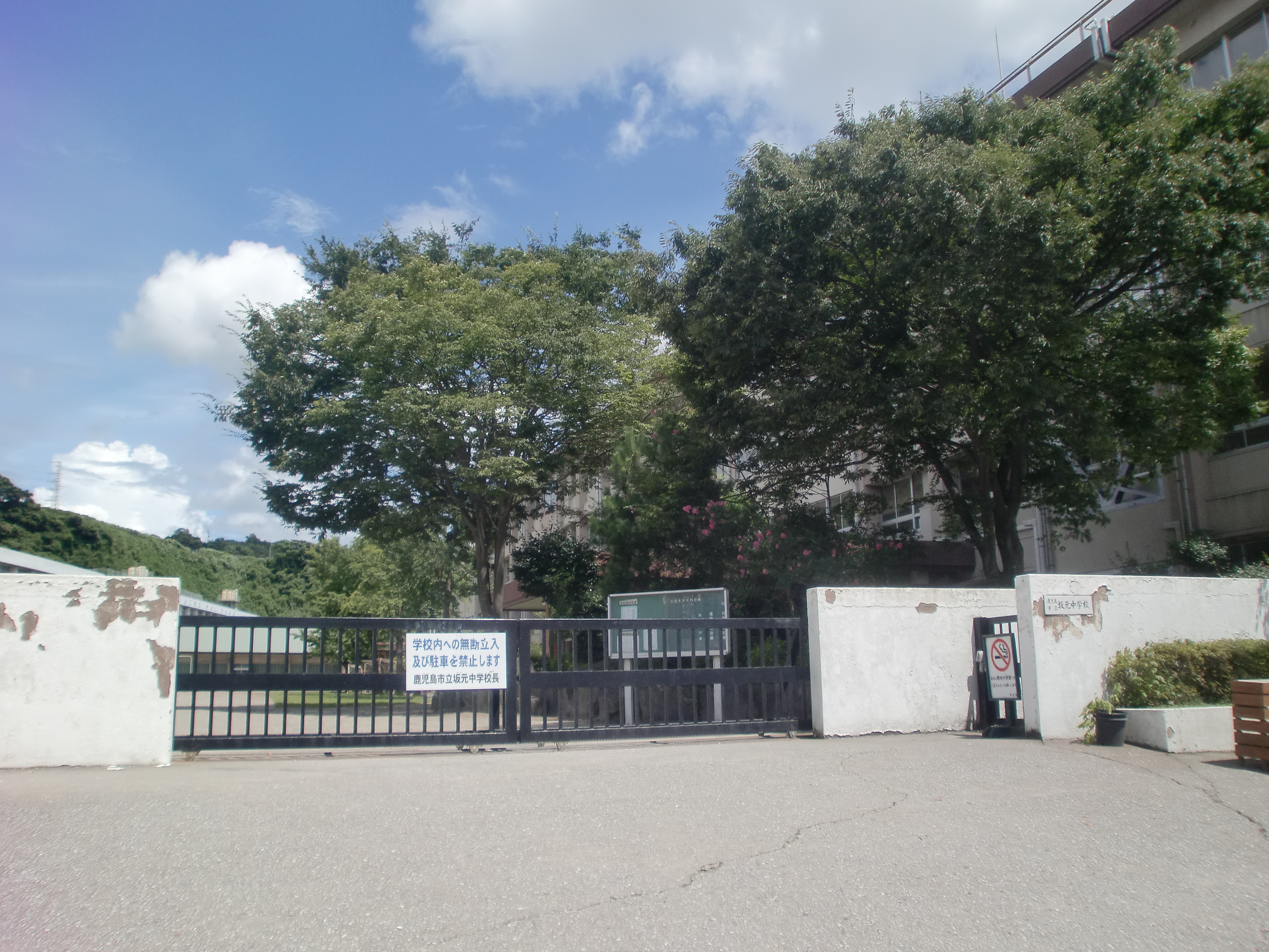 鹿児島市立坂元中学校の外観。